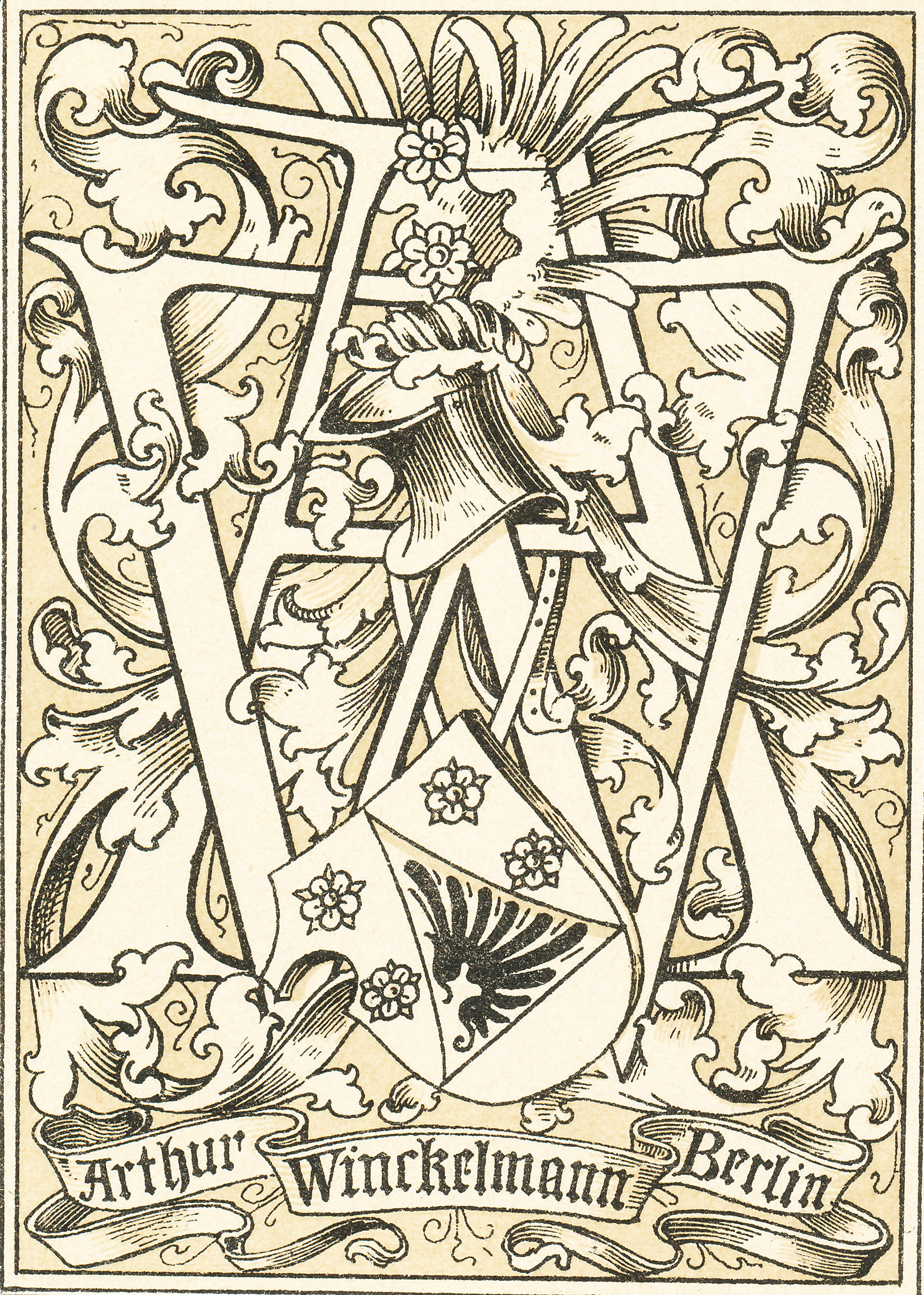 Ex-Libris für Arthur Winckelmann aus Berlin